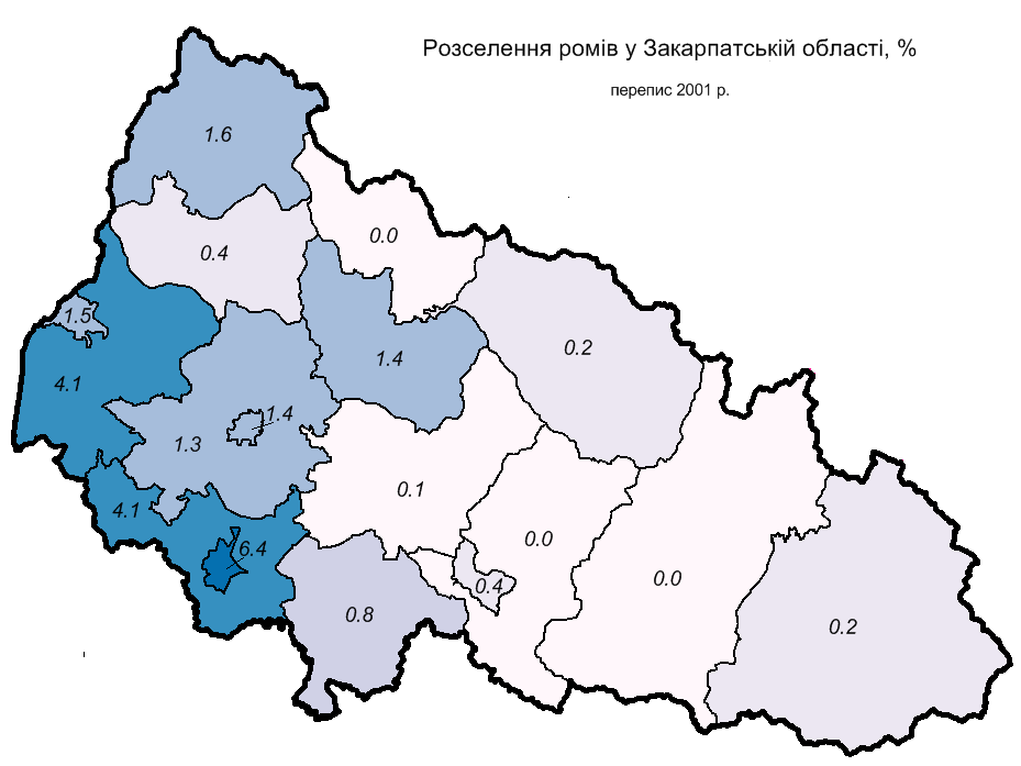 Частка циган (ромів) у населенні Закарпатської області за переписом 2001 року / Percentage of roma people in Zakarpatska oblast (Transcarpathia) 2001 census